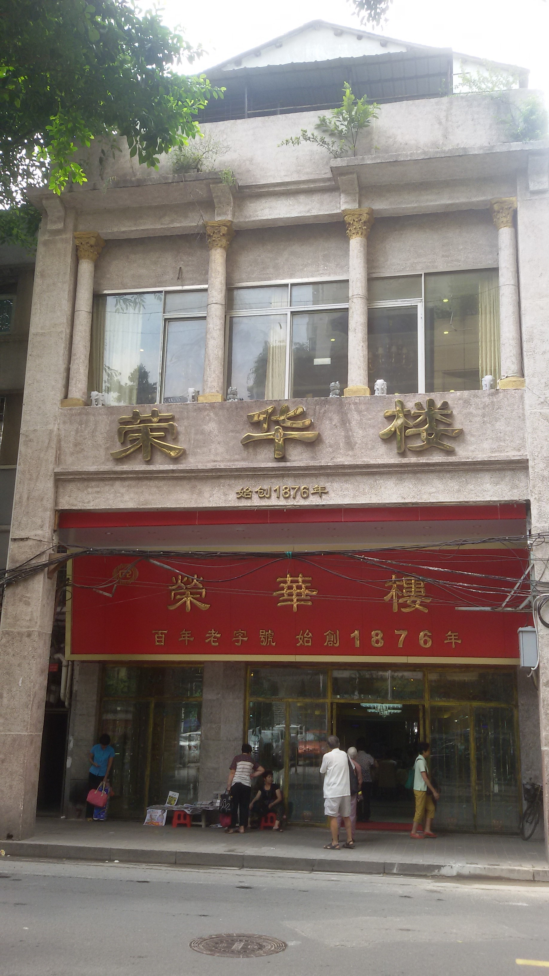 粵語: 廣州嘅榮華樓